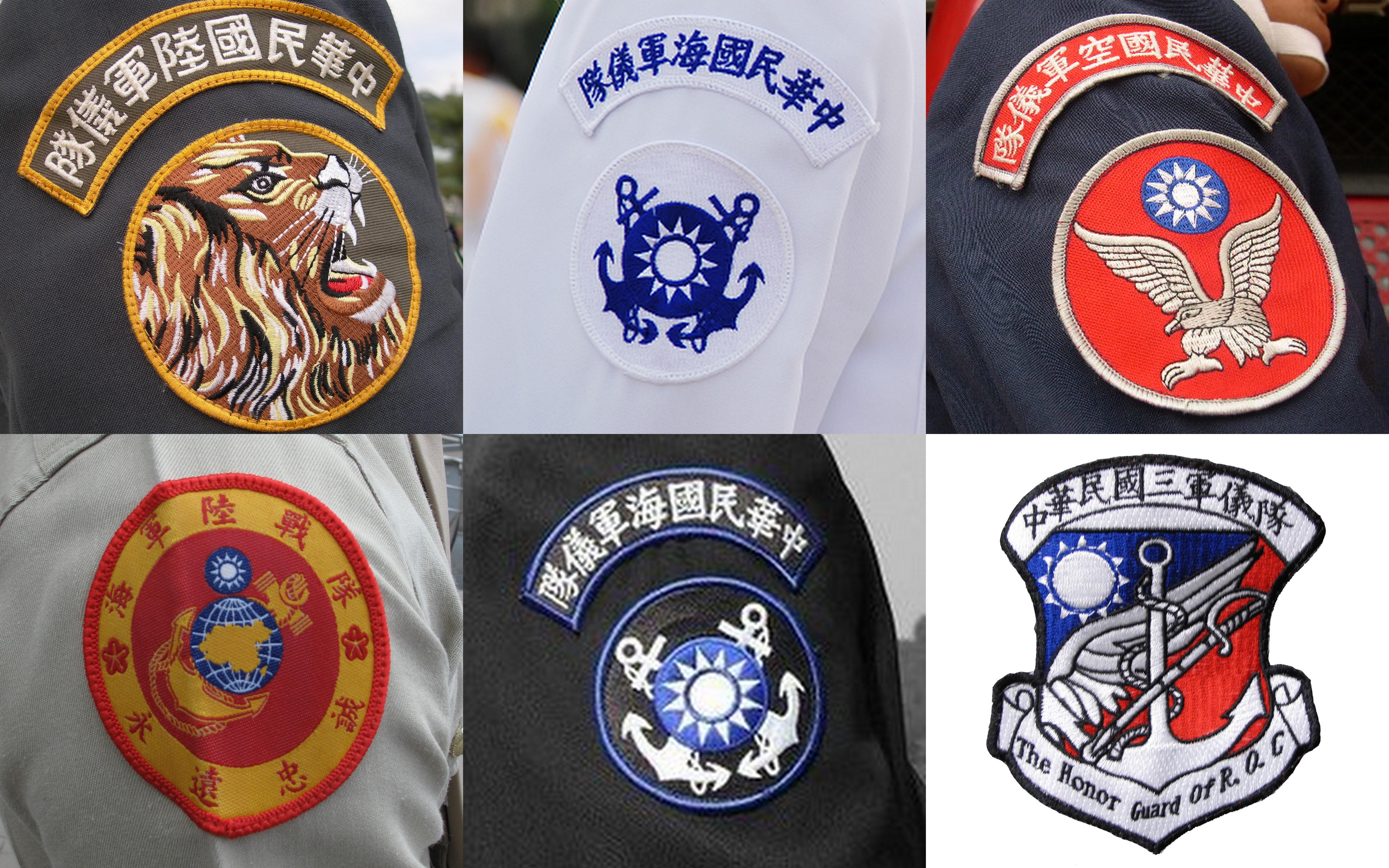 中華民國三軍儀隊臂章一覽圖。